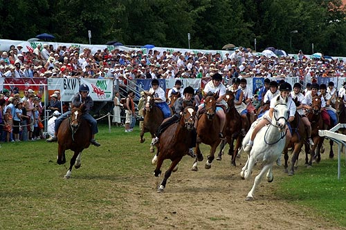 Marché-Concours 2004: Course campagnarde